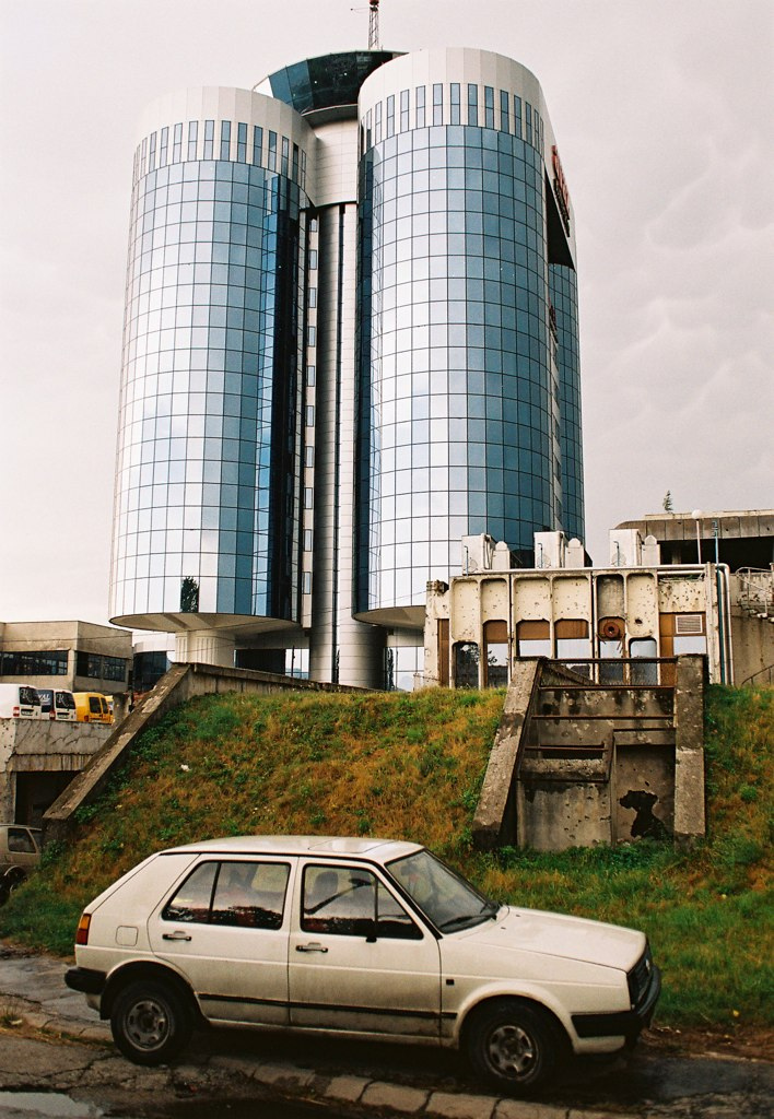 Oslobodjenje, Sarajevo.